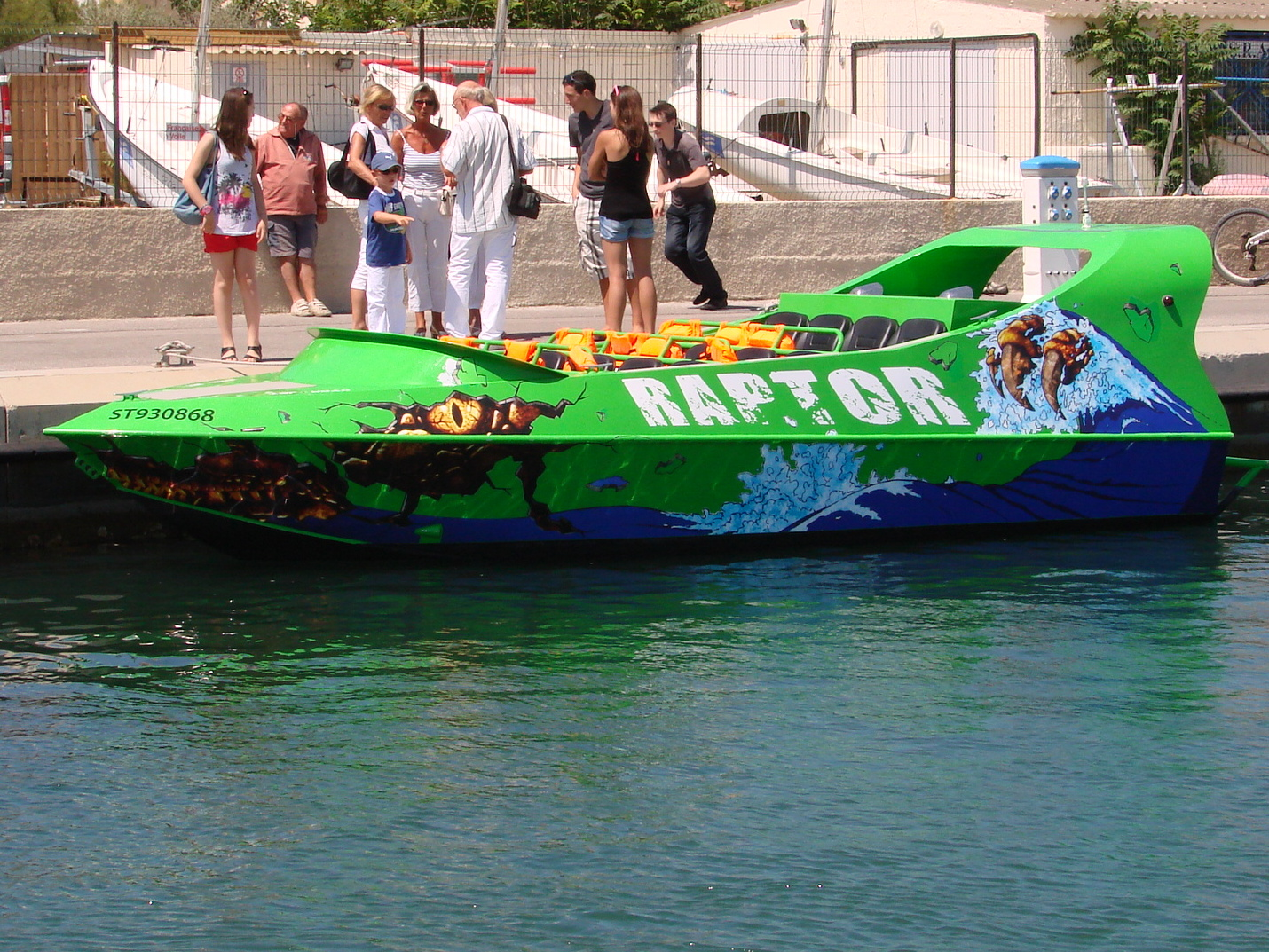 hydrojet à Frontignan (34, Hérault, France)